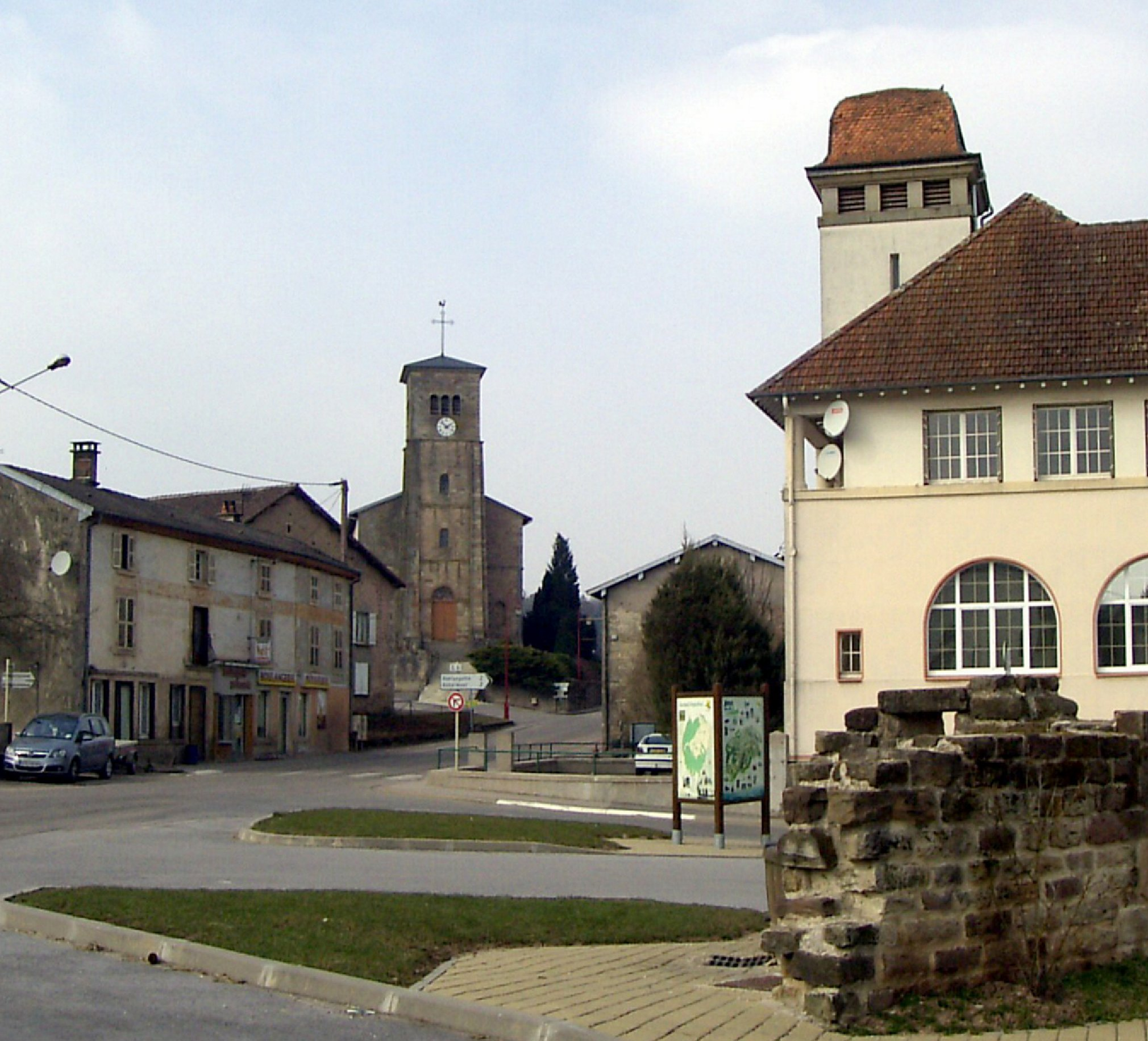 Centre du village de Charmois-l'Orgueilleux